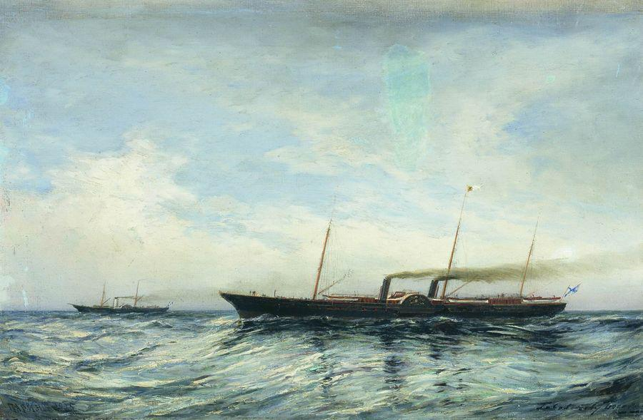 «Яхты "Держава" и "Забава" (при открытии Морского канала).» Derzhava and Zabava